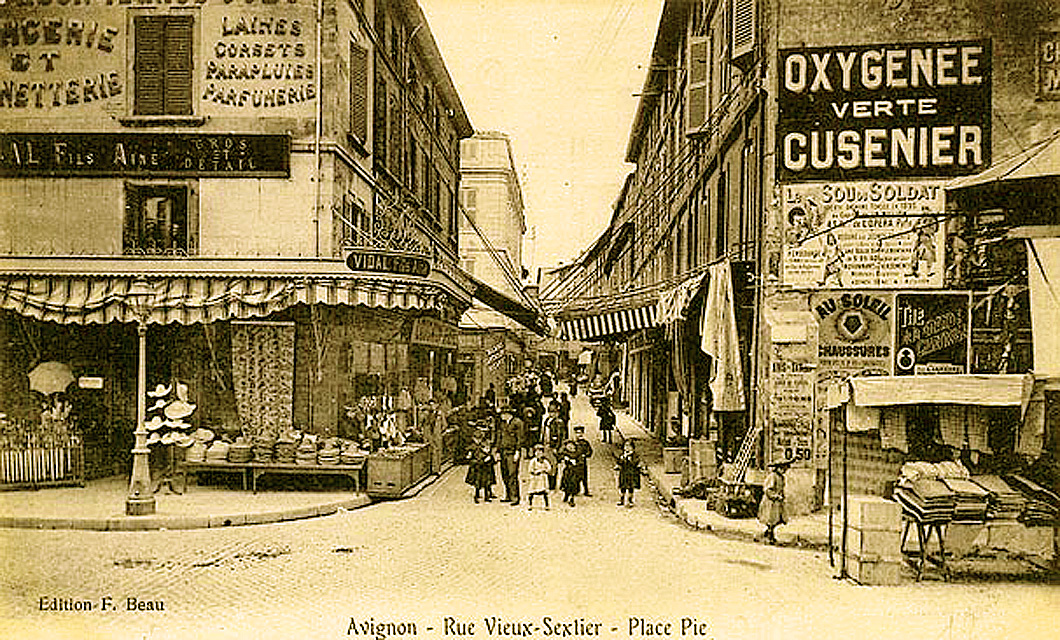 Vue de la Rue du Vieux Sextier d'Avignon prise de la Place Pie